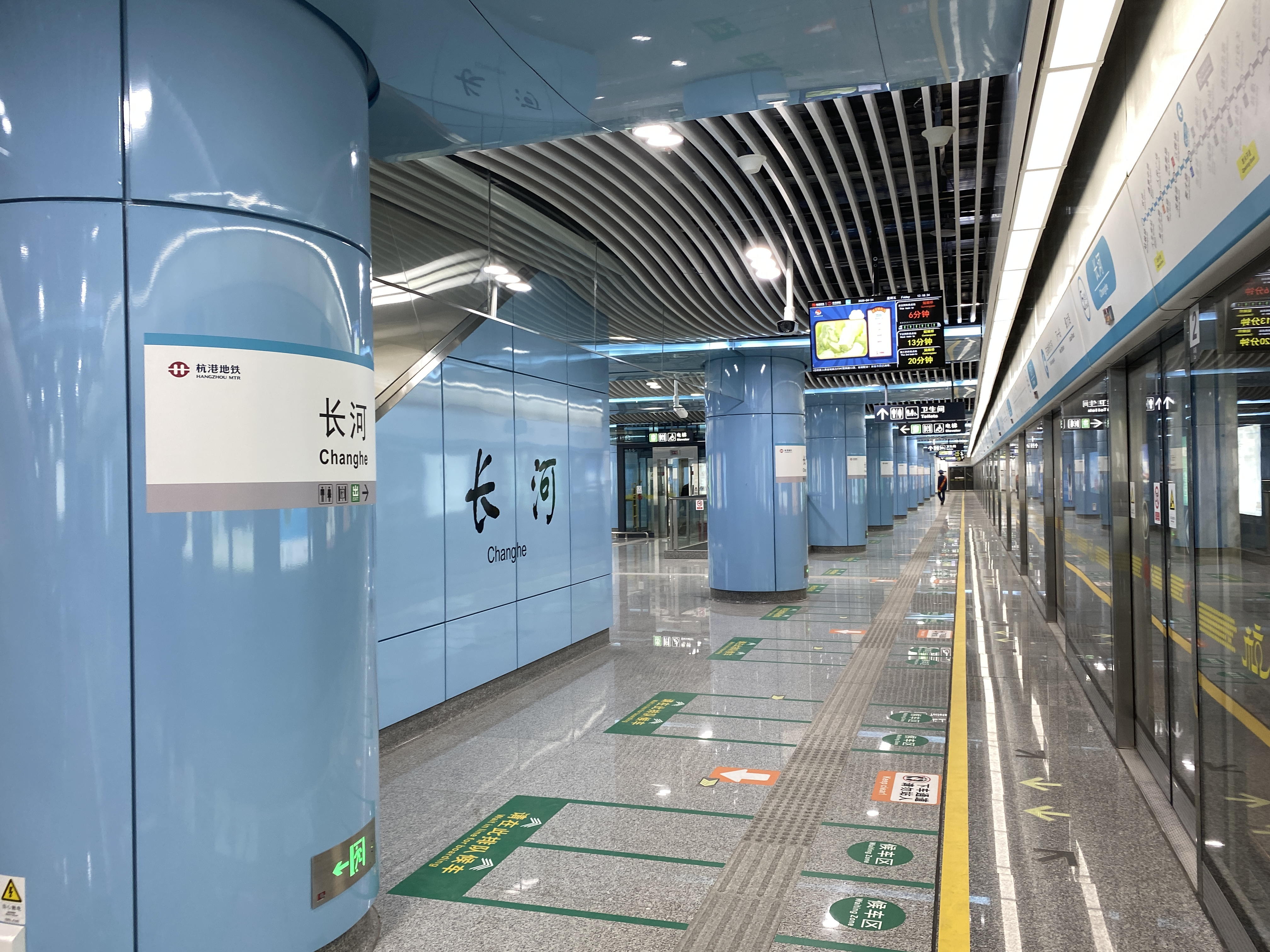 长河站大字壁